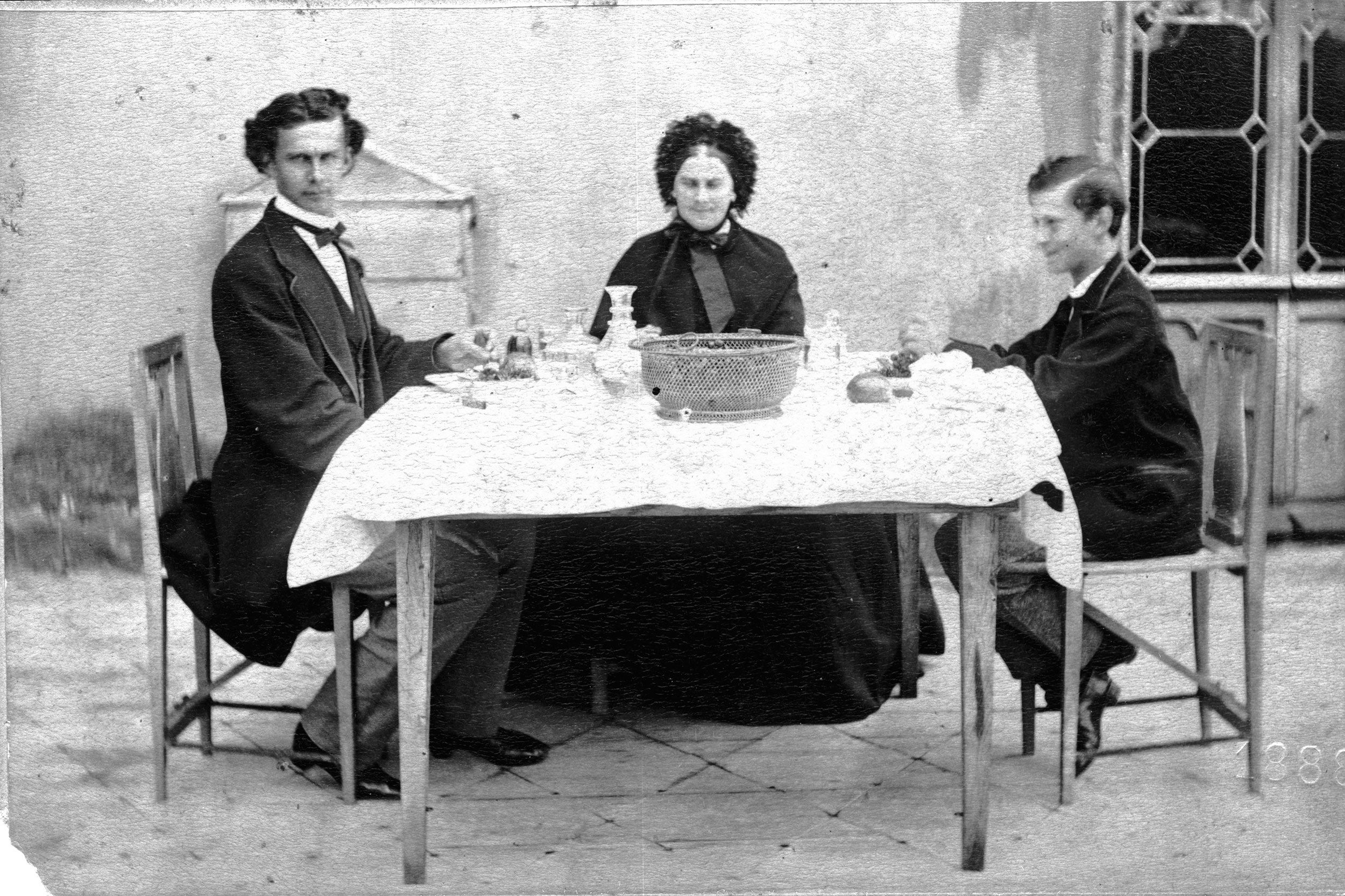 Photo - Prinz Ludwig - Königin Marie - Prinz Otto